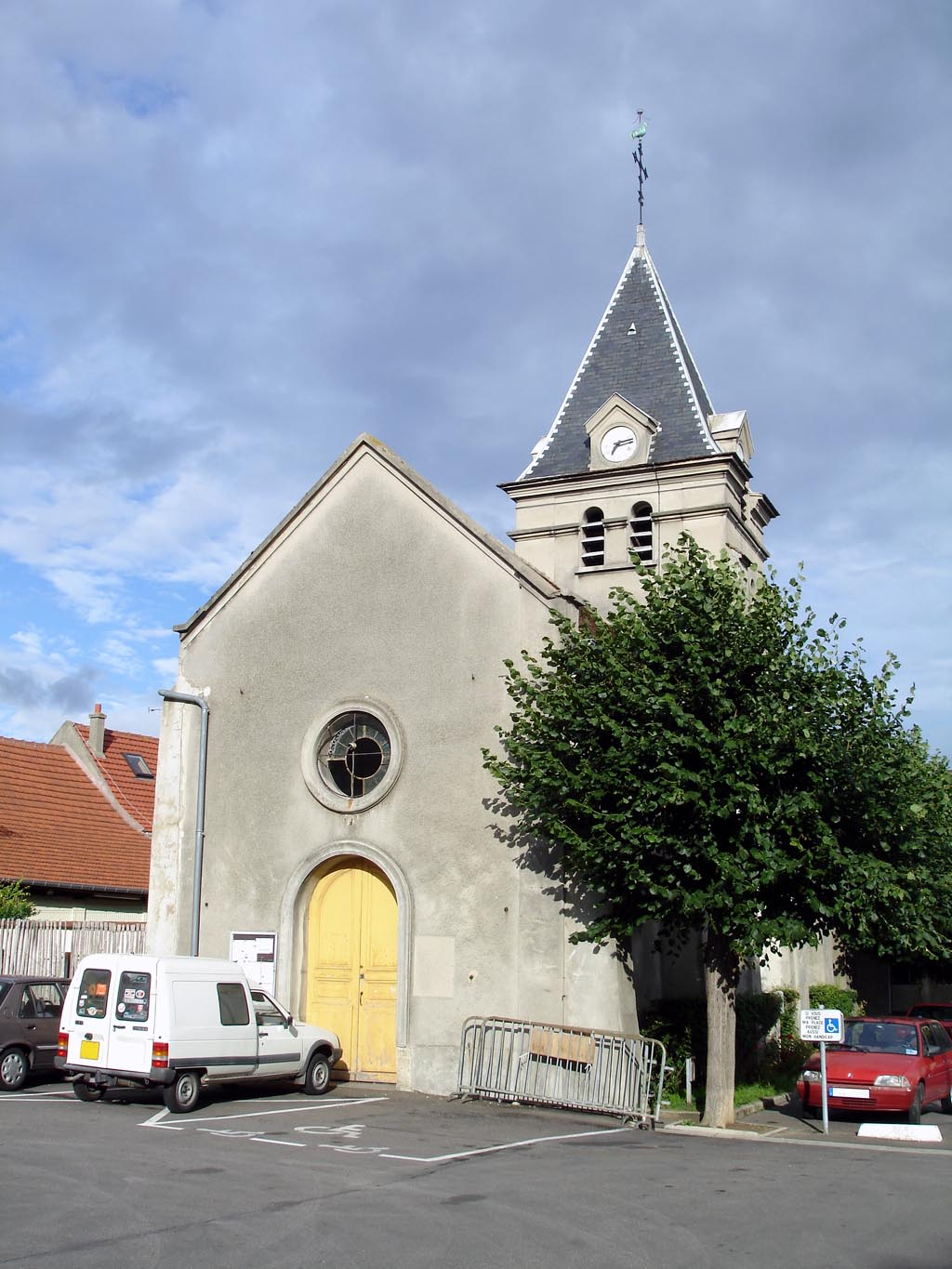 Façade de l'église du Plessis-Bouchard (Val-d'Oise), France